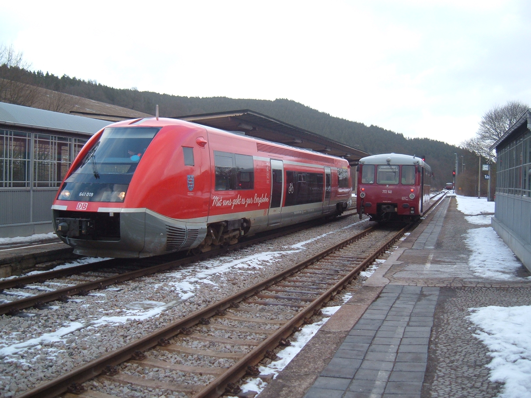 Zwei der Dieseltriebwagen der OBS: Links 641 029, rechts 172 (772) 140. Bahnhof Rottenbach, 2012.